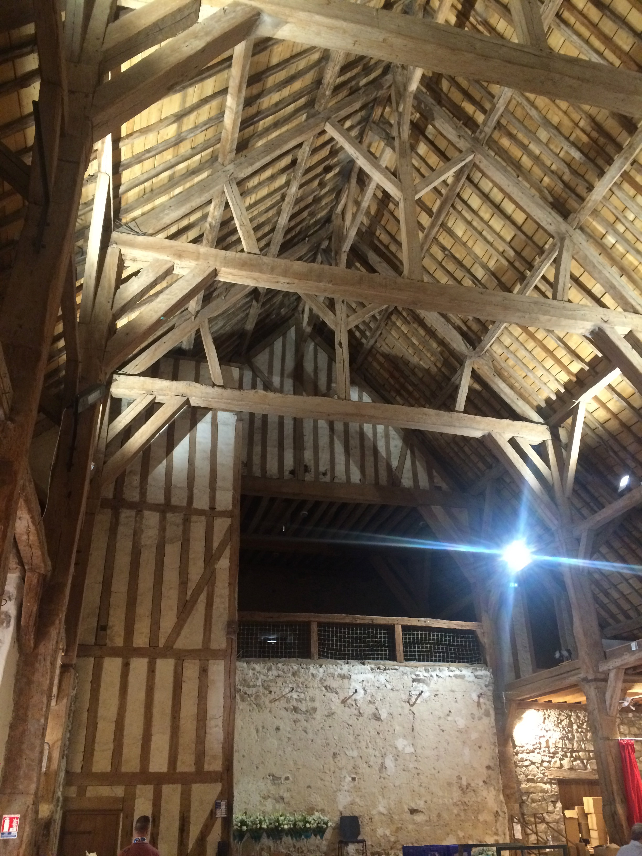 À Samoreau (France), l'intérieur de la grange aux dîmes